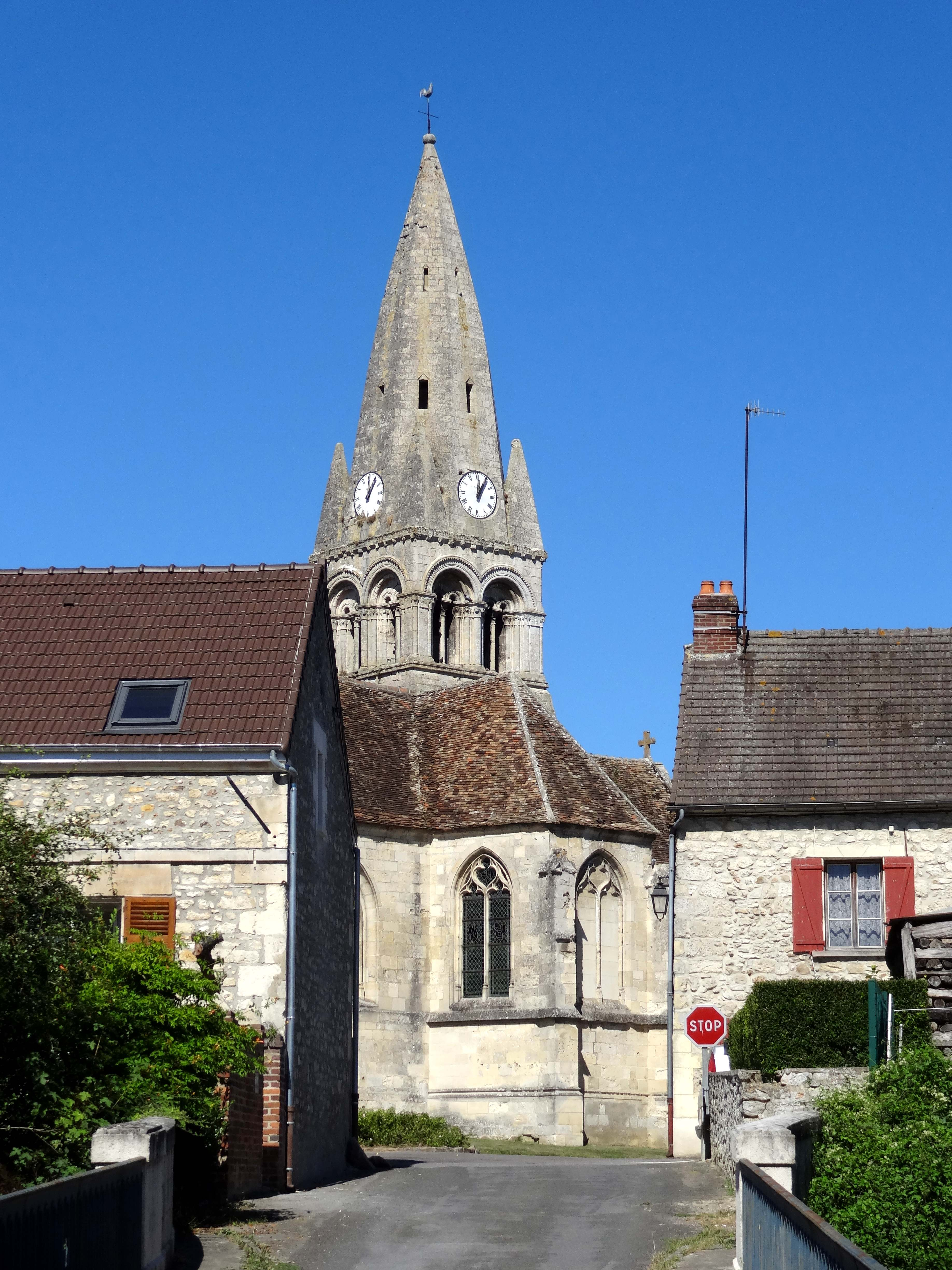 Église Sainte-Geneviève de Marolles - voir titre.